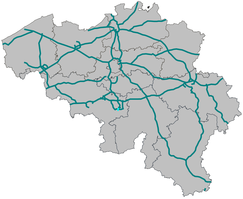 Traject A503 (België)